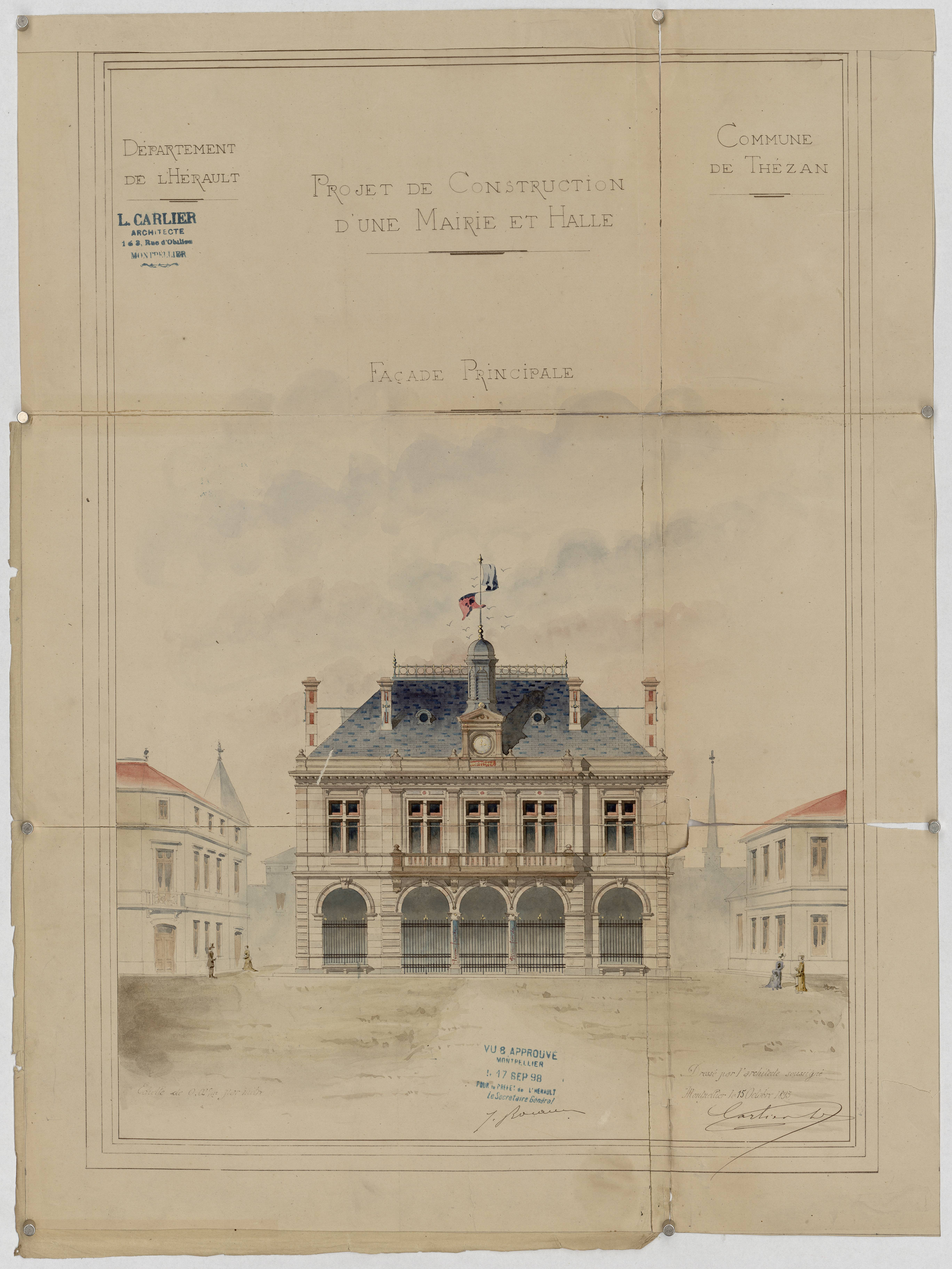 Thézan-lès-Béziers. - Projet de construction d'une mairie et halle : façade principale.